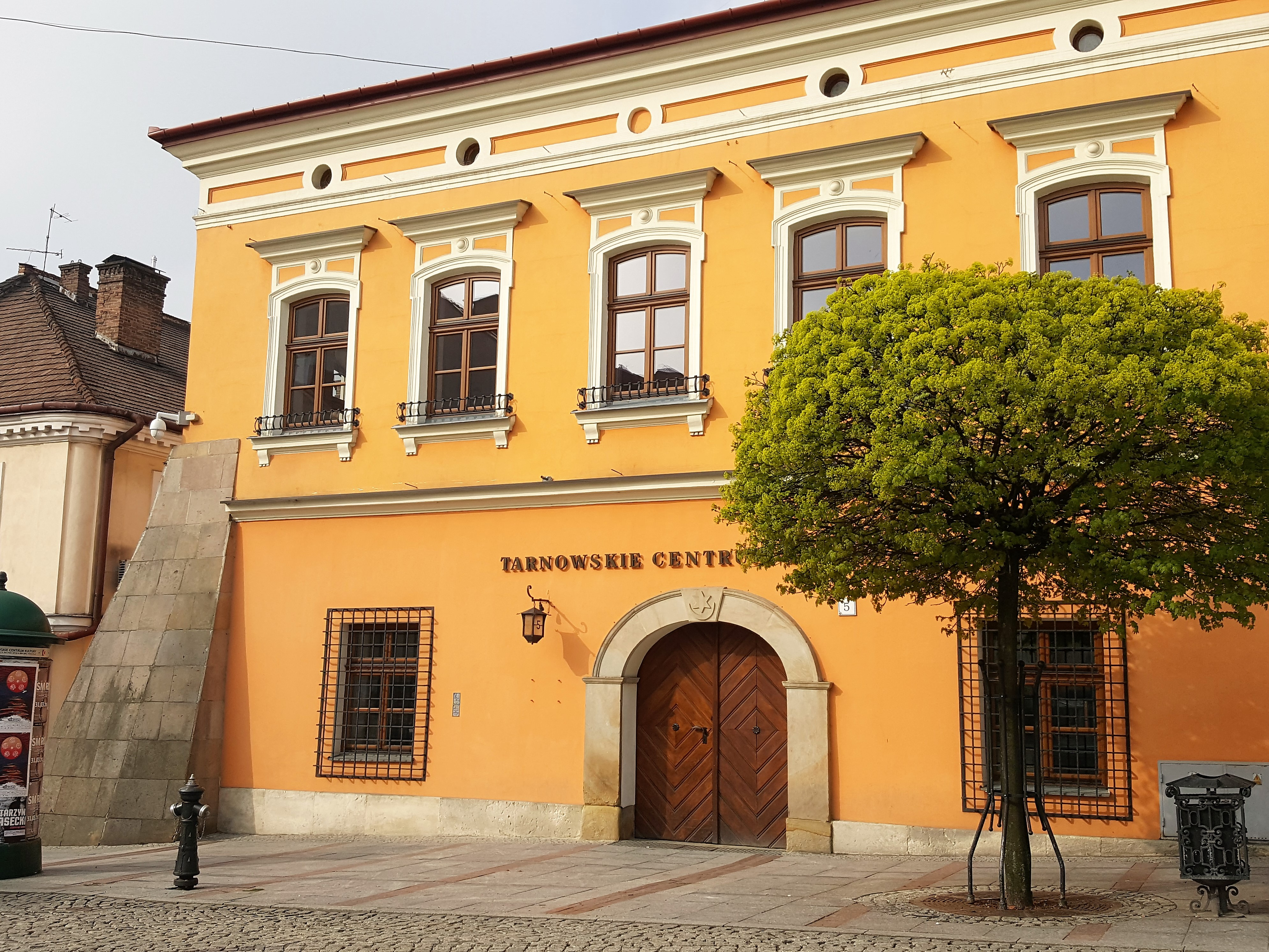 Kamienica Ratajewiczowska w Tarnowie. Widok od strony Rynku.